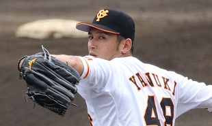 Giants yanuki48